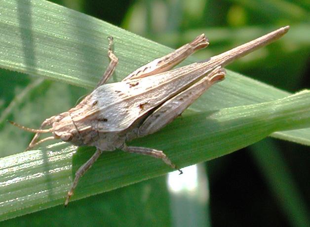 Tetrix subulata, f., Säbeldornschrecke, Weibchen, NSG Kirchwerder Wiesen, Elbmarsch bei Hamburg, Deutschland